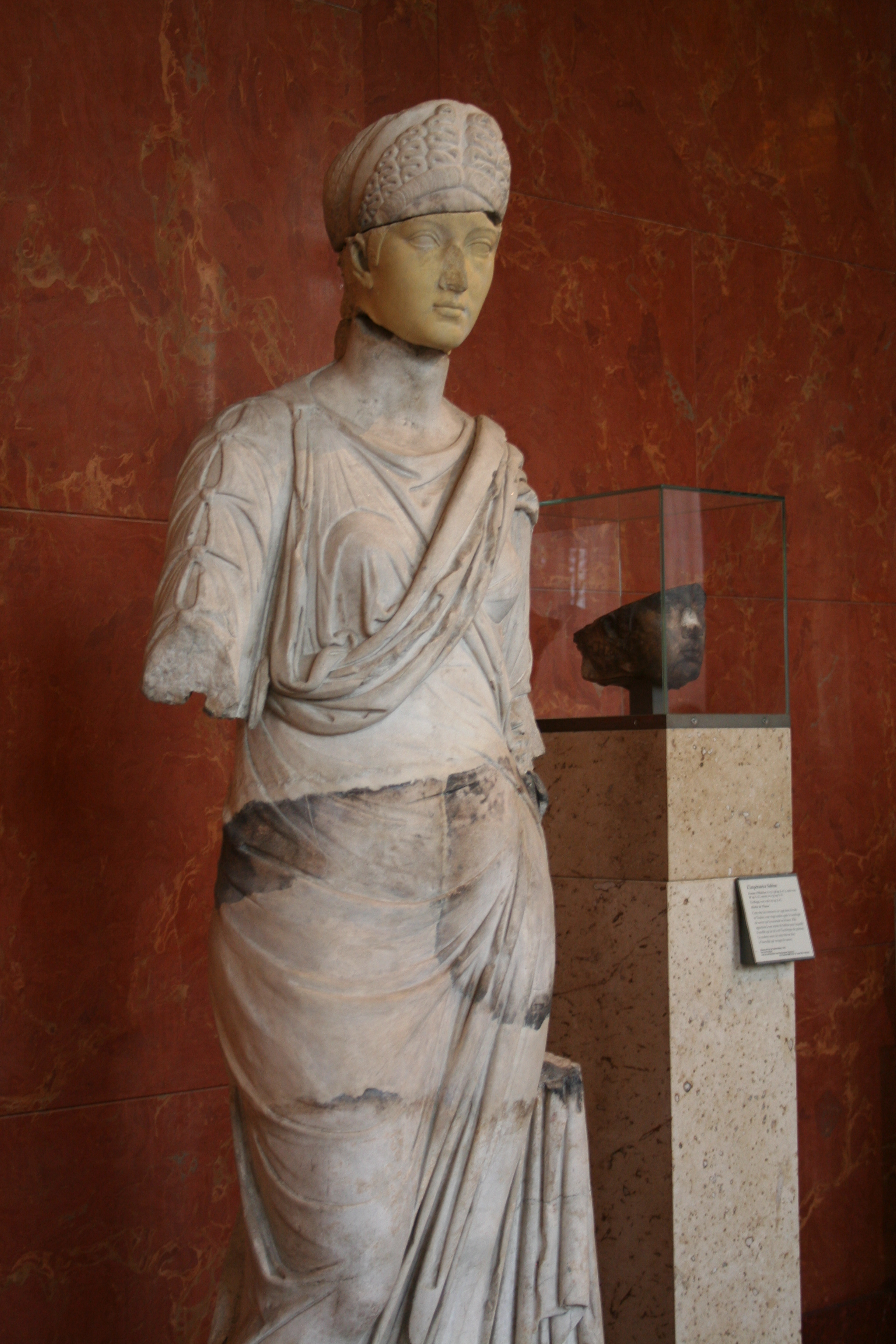 Statue de l'impératrice Sabine provenant de Carthage et des fouilles du "Magenta", Musée du Louvre, Paris